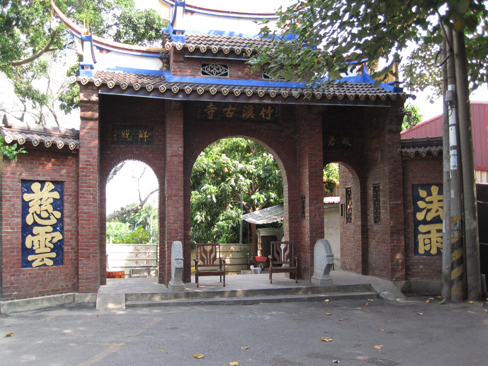 臺南竹溪寺舊山門